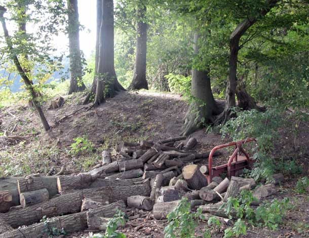 foto dijk bij haanwijk